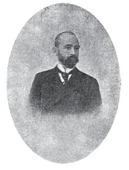 Васил Кънчов.